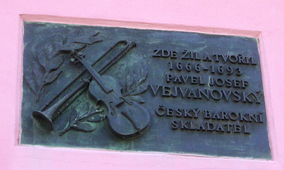 Pavel Josef Vejvanovský pamětní deska v Kroměříži